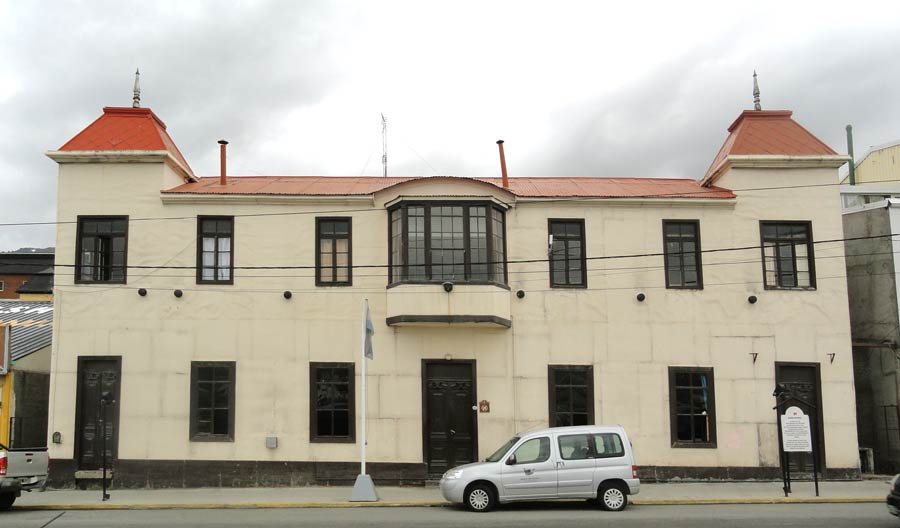 Antiga Casa Ramos, Ushuaia